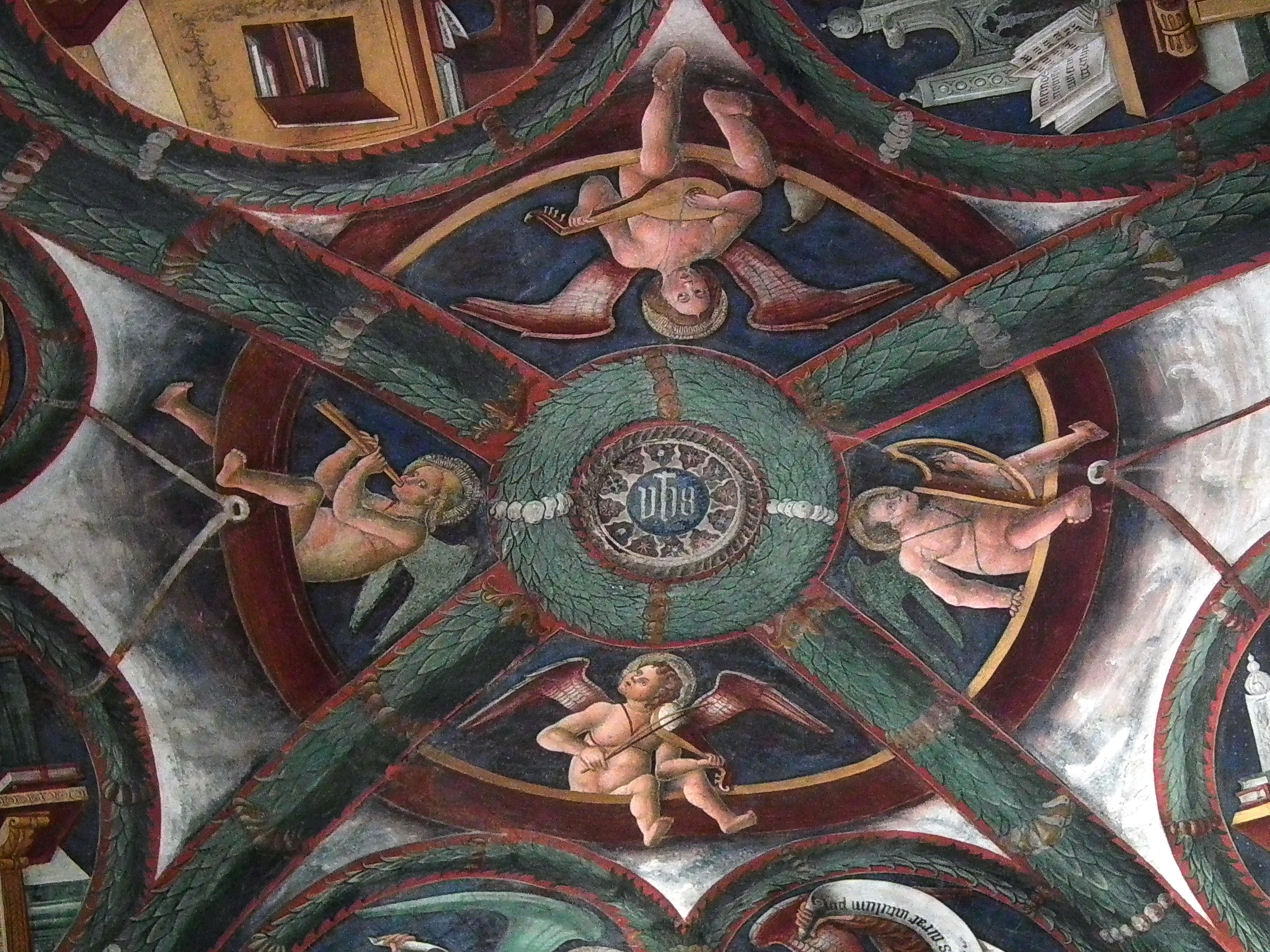 Frescos inside Oratorio dei Disciplini, Clusone Oratorio dei Disciplini Native nameOratorio dei DiscipliniLocationClusone, Lombardy, ItalyCoordinates45° 53′ 29.4″ N, 9° 56′ 54.3″ E Established1484Authority control : Q3884417 institution QS:P195,Q3884417